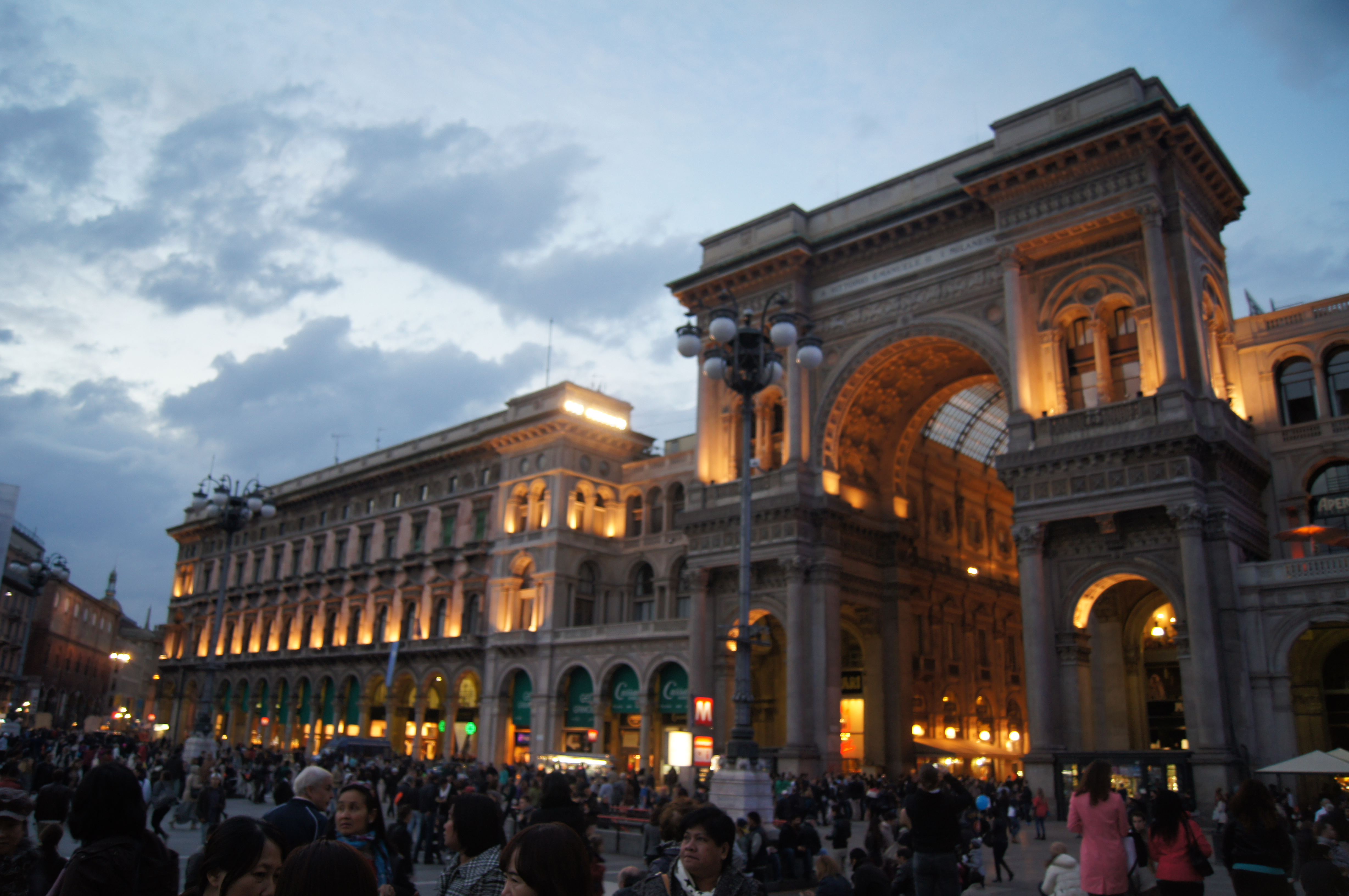 Milano